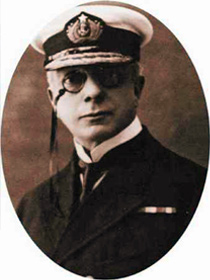 Admiral Luis Gomez Carreño (Chile)